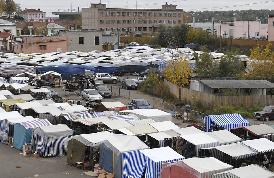 Textil-Markt in Kineschma 2006